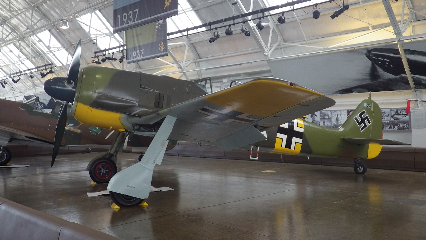 Focke Wulf Fw190A-5 of Flying Heritage Collection